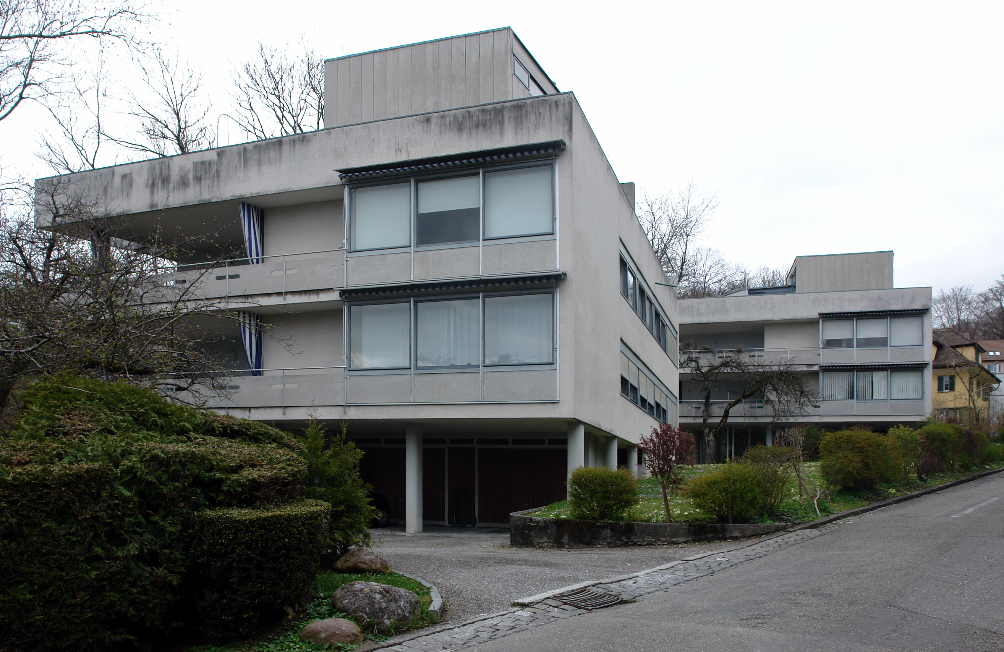 Mehrfamilienhäuser Doldertal, Zürich, 1933-36 in Switzerland, Architects: Alfred Roth, Emil Roth, Marcel Breuer